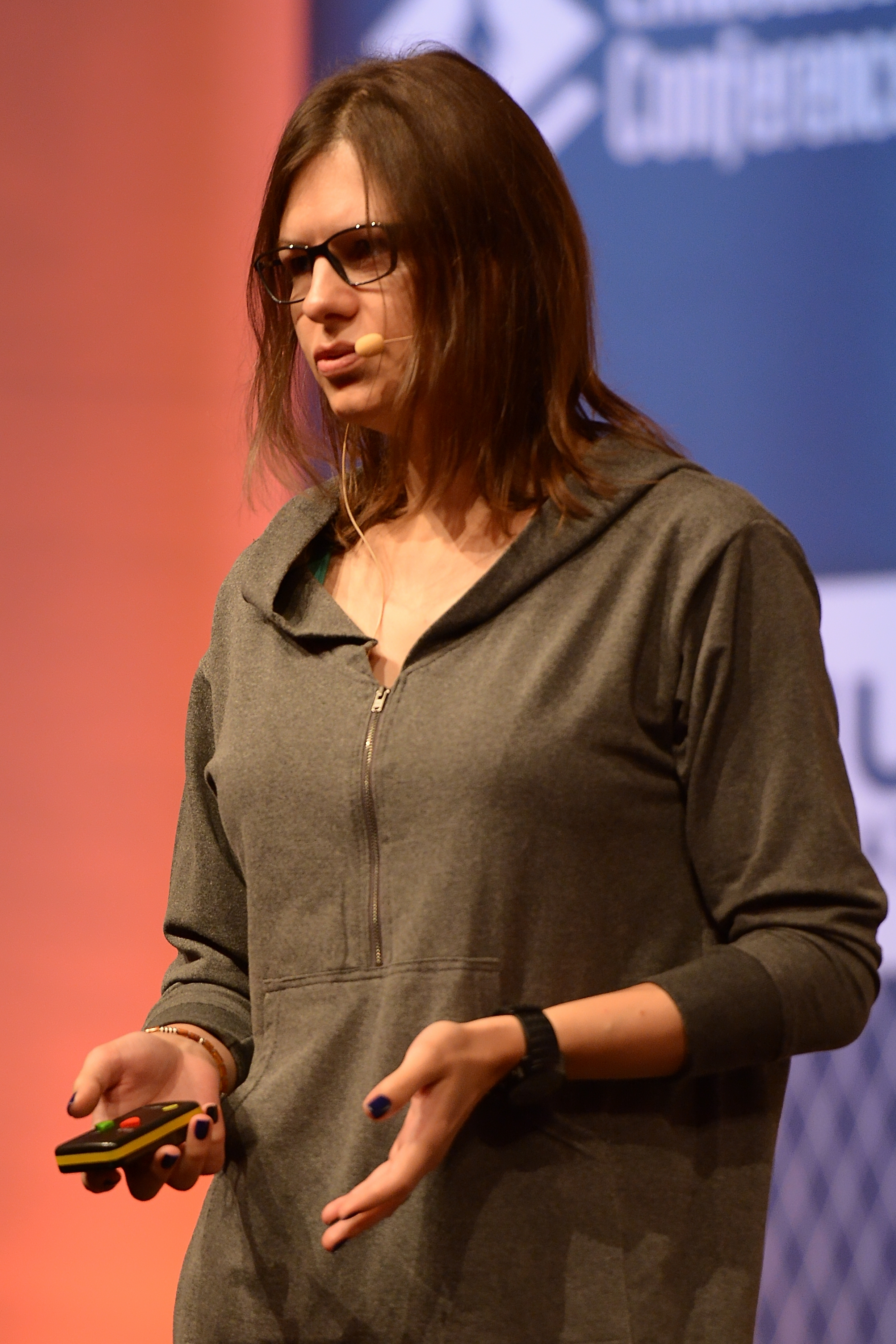 Joanna Rutkowska speaking at the LinuxCon Europe 2014 in Düsseldorf